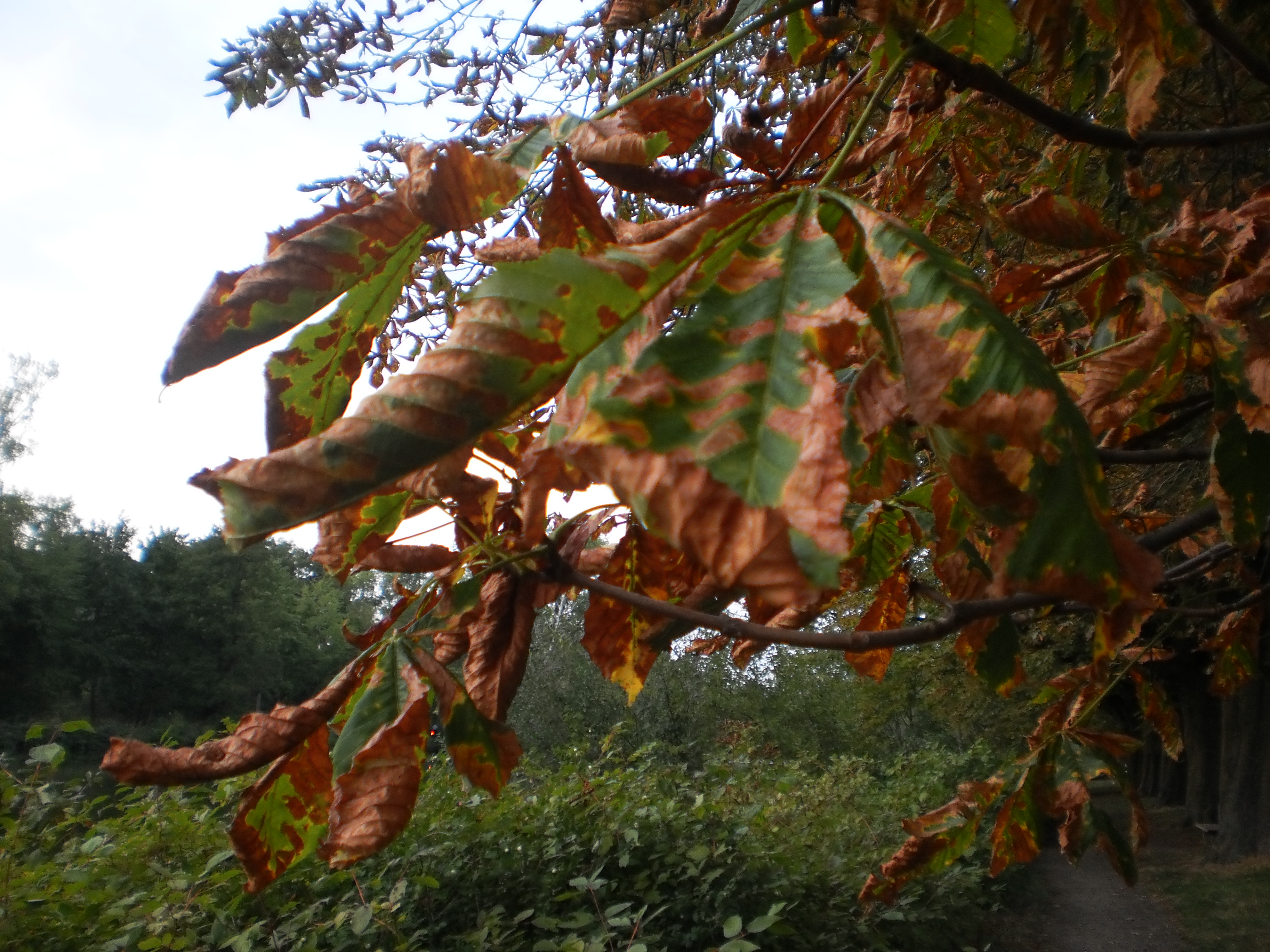 Braun werdendes marmoriertes grünes Laub nach Trockenheit im August 2018 (Link zum Wikipedia-Artikel Trockenstress), dry trees and Aesculus hippocastanum leaves near pond in a park (Schwanenteich), early autumn in Germany, Kastanienallee Eichgärtenallee und Schwanenteich in Giessen im Abendlicht, Photo am 2018-08-21.